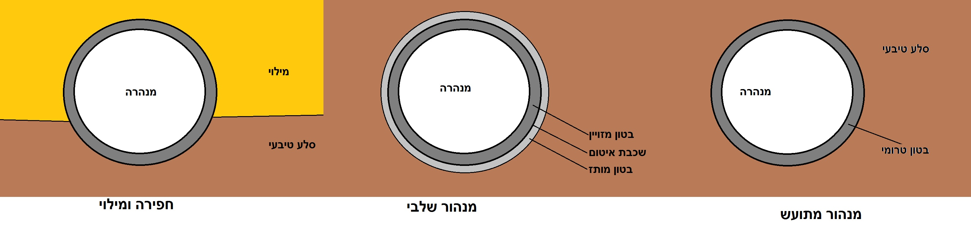 סוגים של מנהור